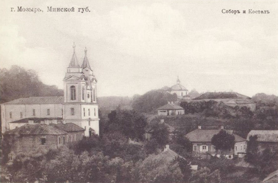 Беларуская (тарашкевіца): Мазыр (Mazyr), вуліца Замкавая (vulica Zamkavaja)